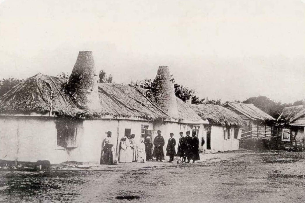 Кабардинцы в ауле Догужикой (Аушигер) 1890-е годы